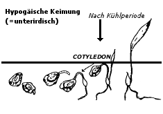 Hypogeal